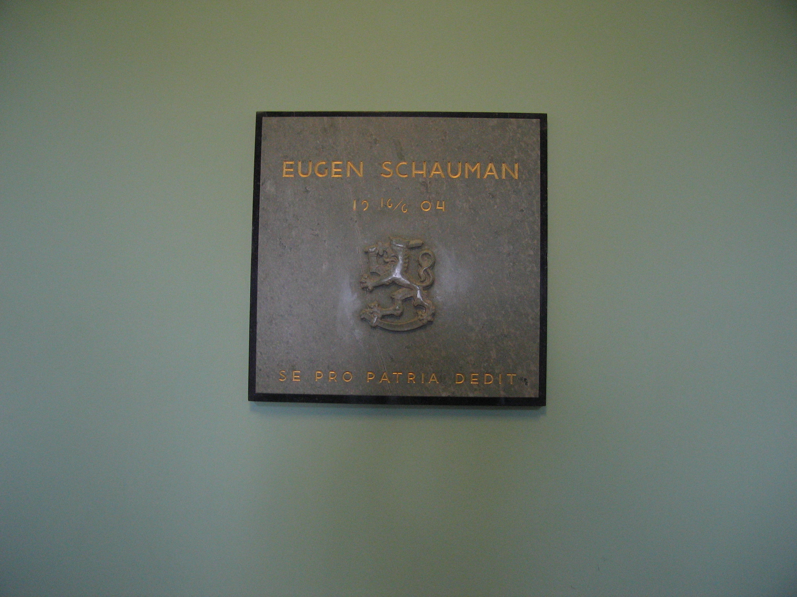 Eugen Schaumanin muistokyltti Valtioneuvoston linnan portaikossa